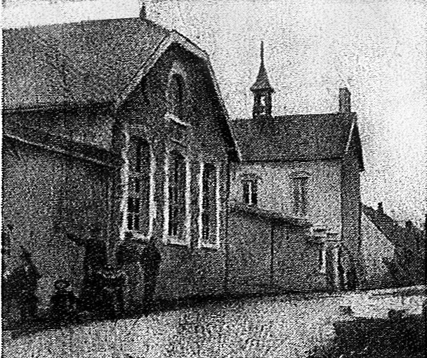 Vue de Tramery.